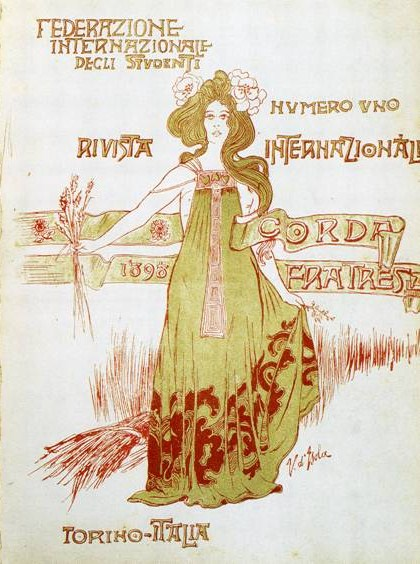 Couverture de la revue éditée par la Corda Fratres.